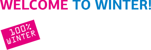 Фирменный слоган WELCOME TO WINTER! 100% WINTER